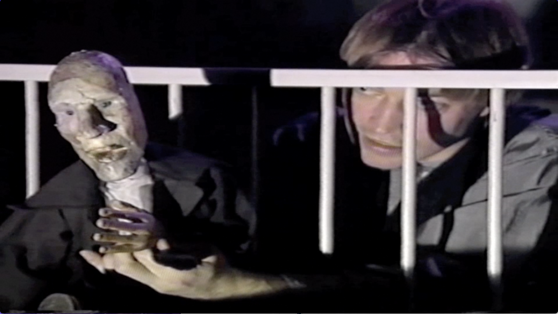 Gisle Hass og Raskolnikov